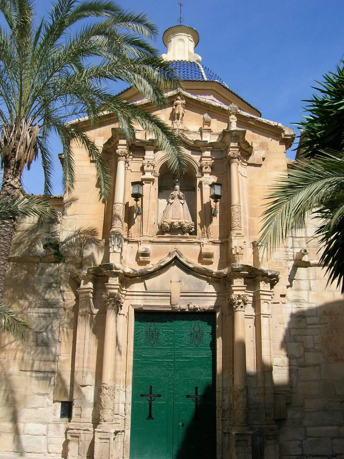 Iglesia de San Juan Bautista Monovar